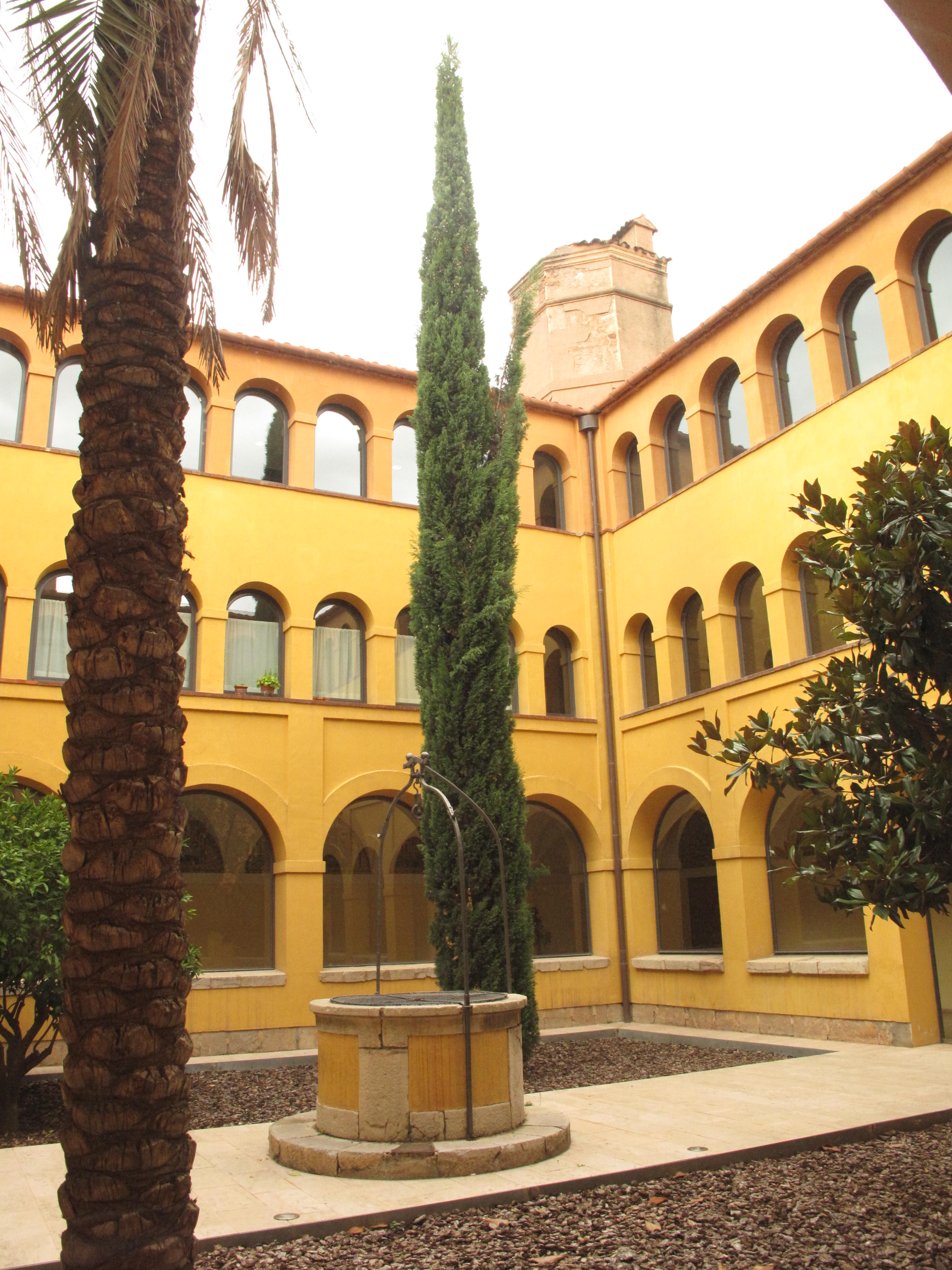 Claustre de Sant Francesc, que forma part del conjunt de l'Hospital de Sant Llàtzer (Terrassa)